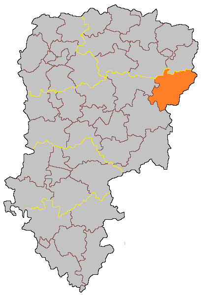 Кантон Розуа-сюр-Сер на карте департамента Эна